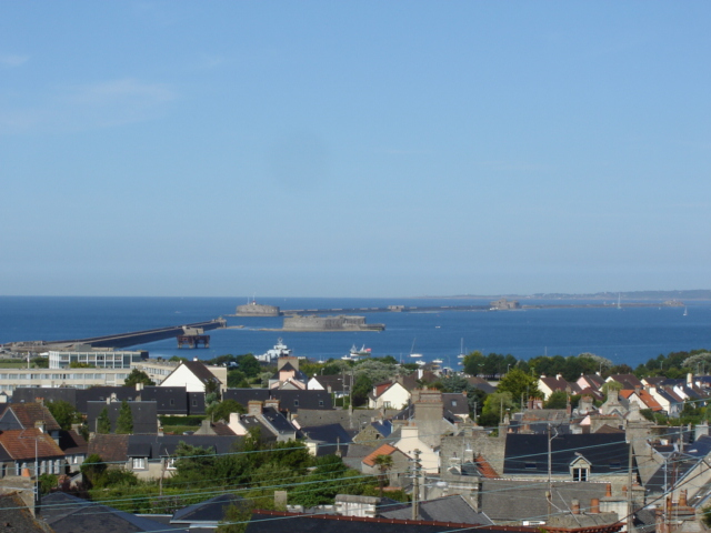 Vue générale sur la rade de Cherbourg depuis les hauteurs de Querqueville.